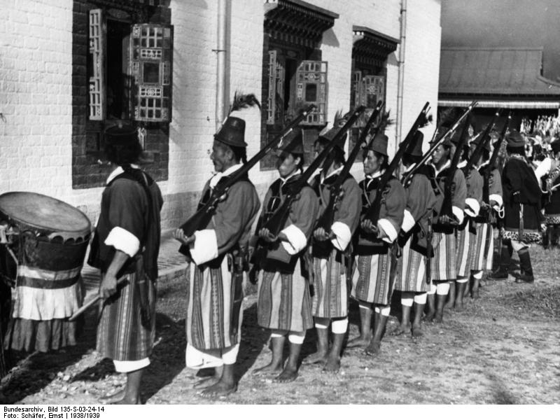 Nach Abschluss des Kriegstanzes der Götter umwandeln die Lepschagarde die Tänzer und die heiligen Pferde in Uhrzeigerrichtung im Tempel von Gangtok